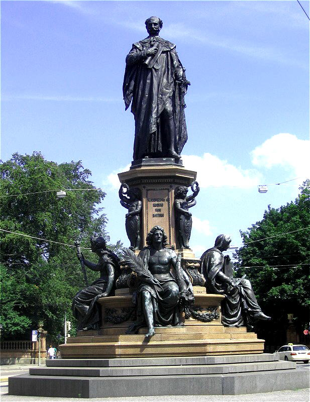 Maxmonument in München. Sculptor: Kaspar von Zumbusch / Caspar Zumbusch.